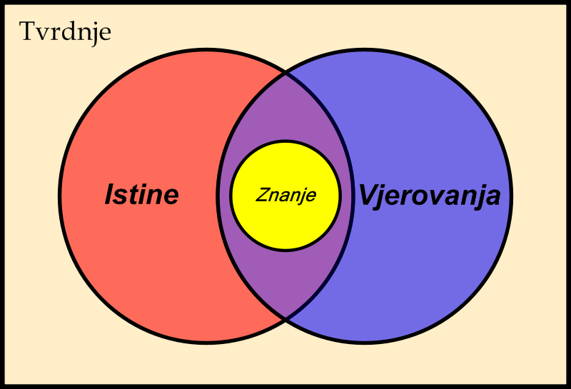 Klasična definicija znanja